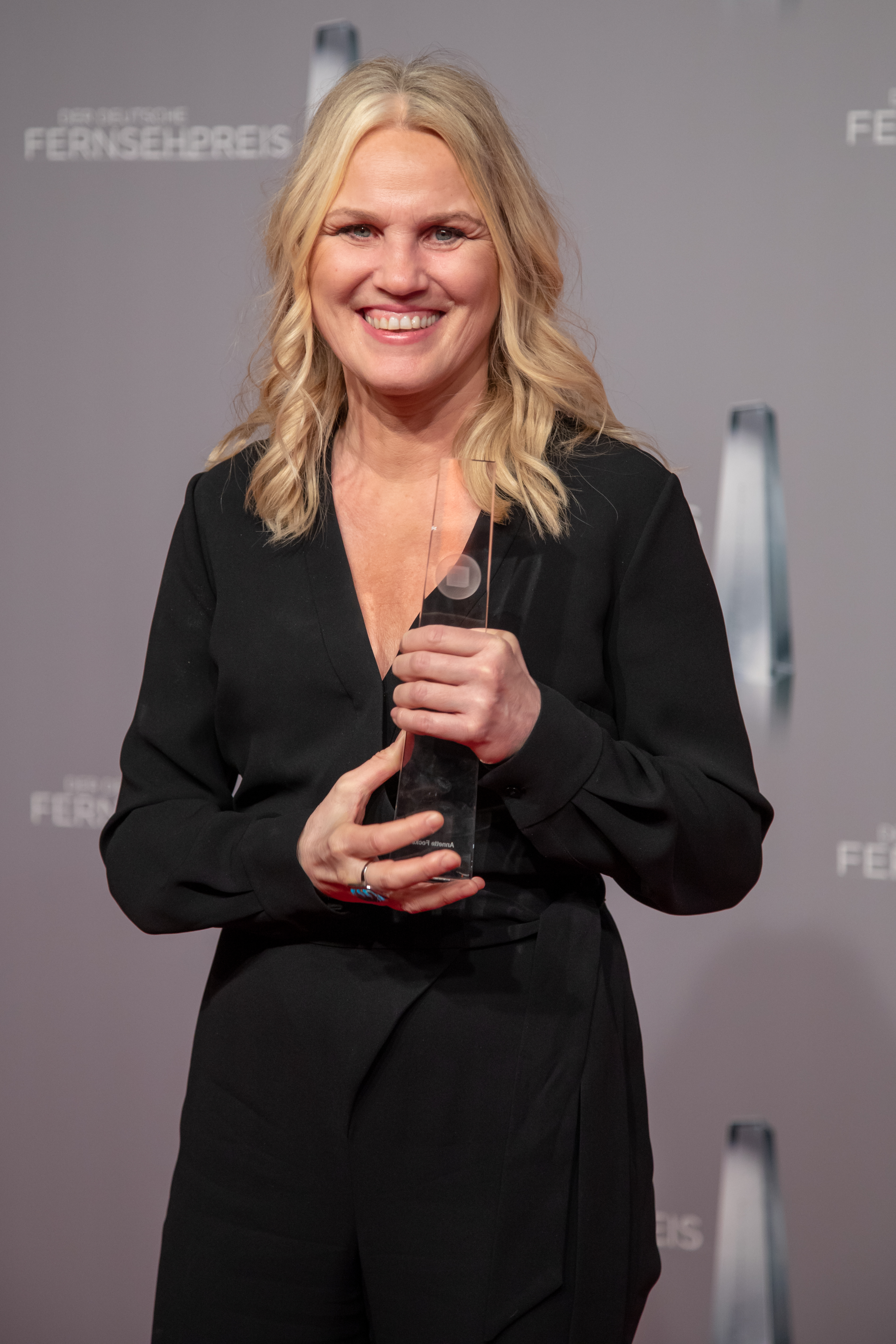 Annette Focks beim Deutschen Fernsehpreis 2019 in der Düsseldorfer Rheinterrasse